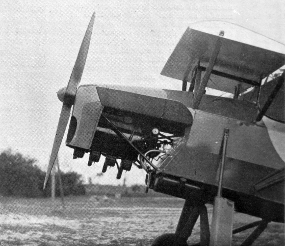 letecký motor Walter Junior 4 a letoun RWD-8 (detail)